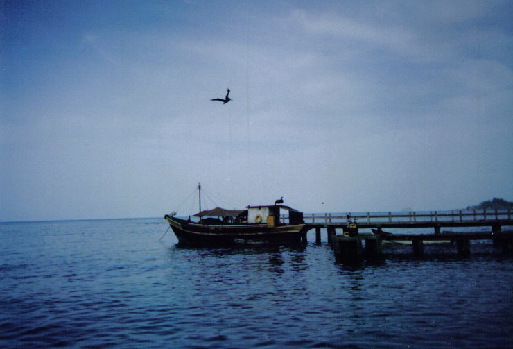 Puerto de Capurganá (Colombia, 1999)